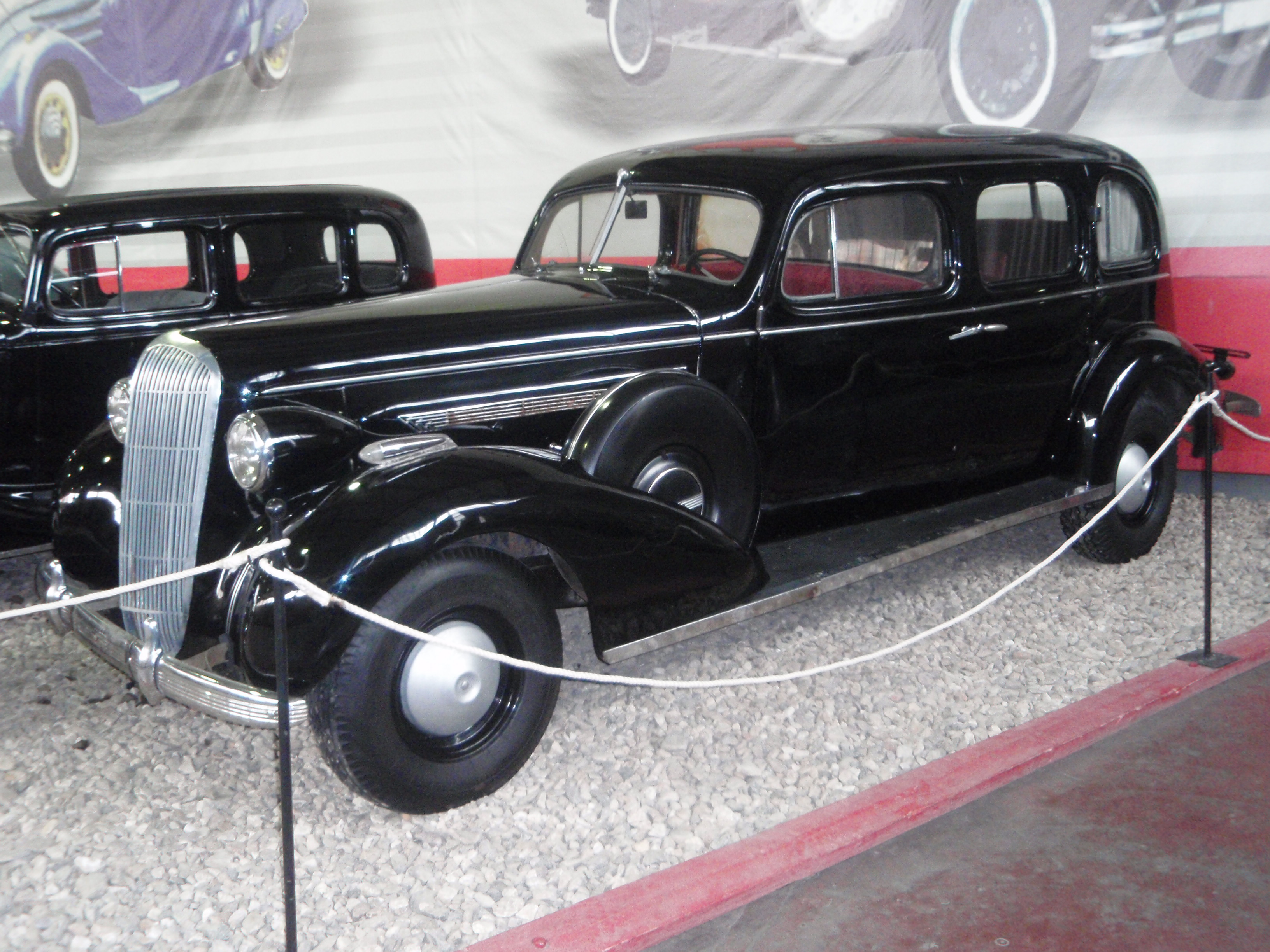 Автомобиль Buick Limited Series 90